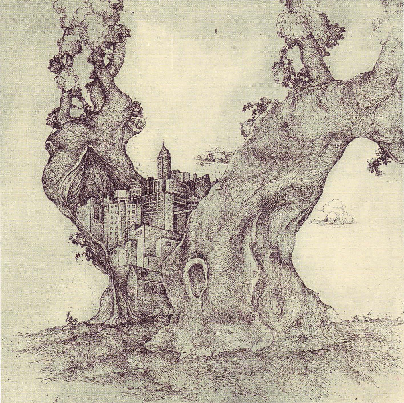 Mahmut Celayir: Lastensattel, Radierung, 23,5 x 22 cm, 1973.